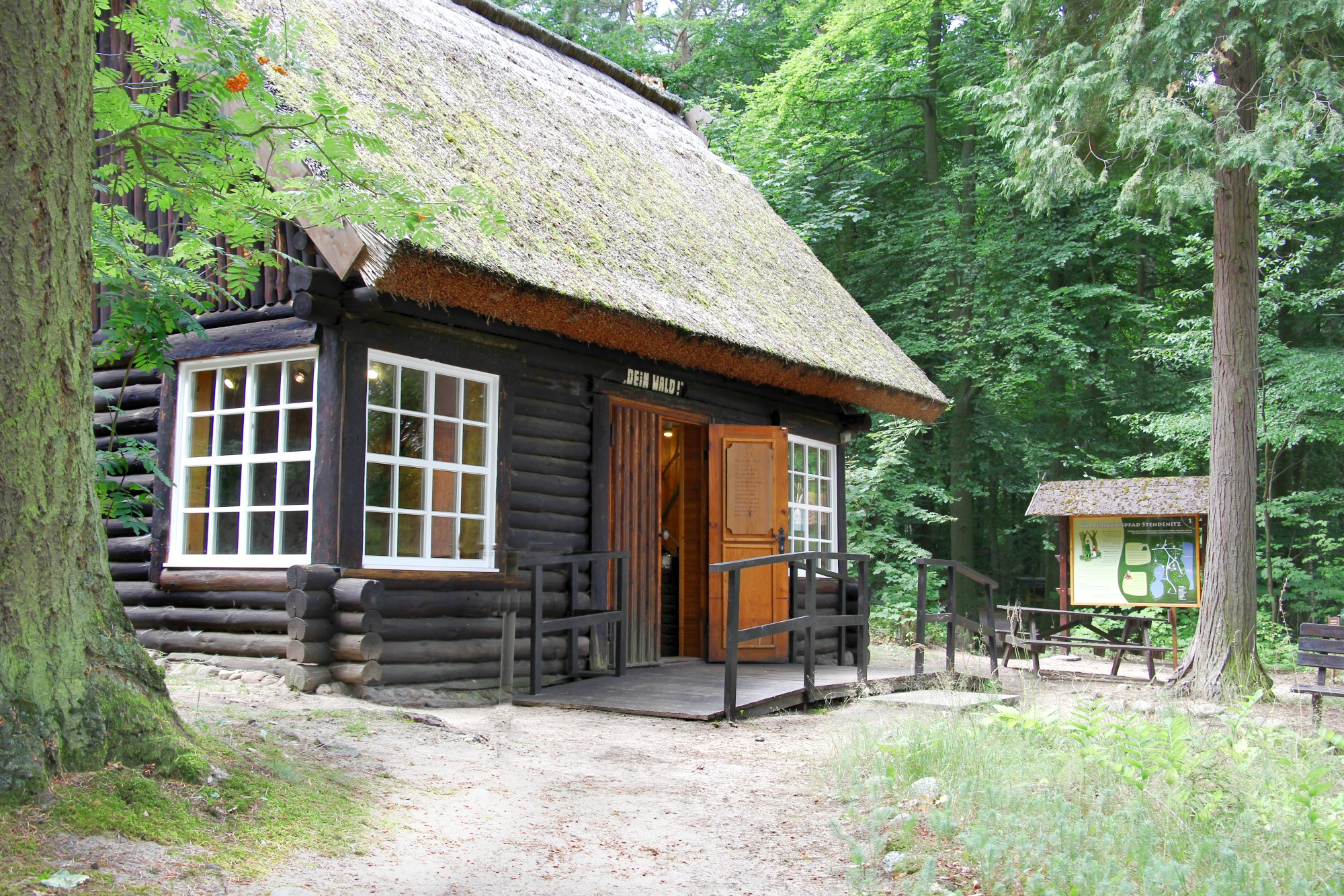 Waldmuseum Stendenitz, Neuruppin, Landkreis Ostprignitz-Ruppin